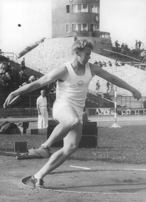 Manfred Grieser Zentralbild Wendorf 12.07.1957 Deutsche Athletik-Meisterschaften 1957. Vom 12. bis 14.07.1957 finden im Berliner Walter-Ulbricht-Stadion die Deutschen Leichtathletik-Meisterschaften 1957 statt. UBz: Neuer deutscher Meister im Diskuswerfen wurde Manfred Grieser (SC Wissenschaft DHfK) mit einer Weite von 49,95 m. Manfred Grieser beim Wurf. Abgebildete Personen: Grieser, Manfred: Diskuswerfer, DDR